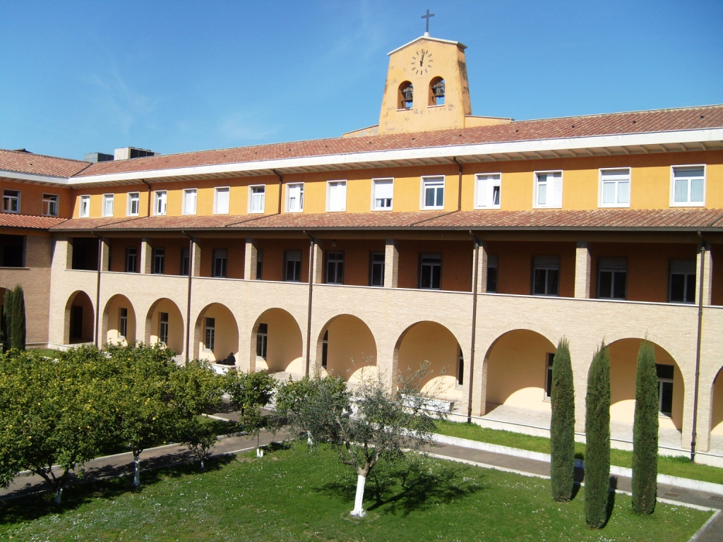 Patio interno de la Facultad Teológica, con la espadaña